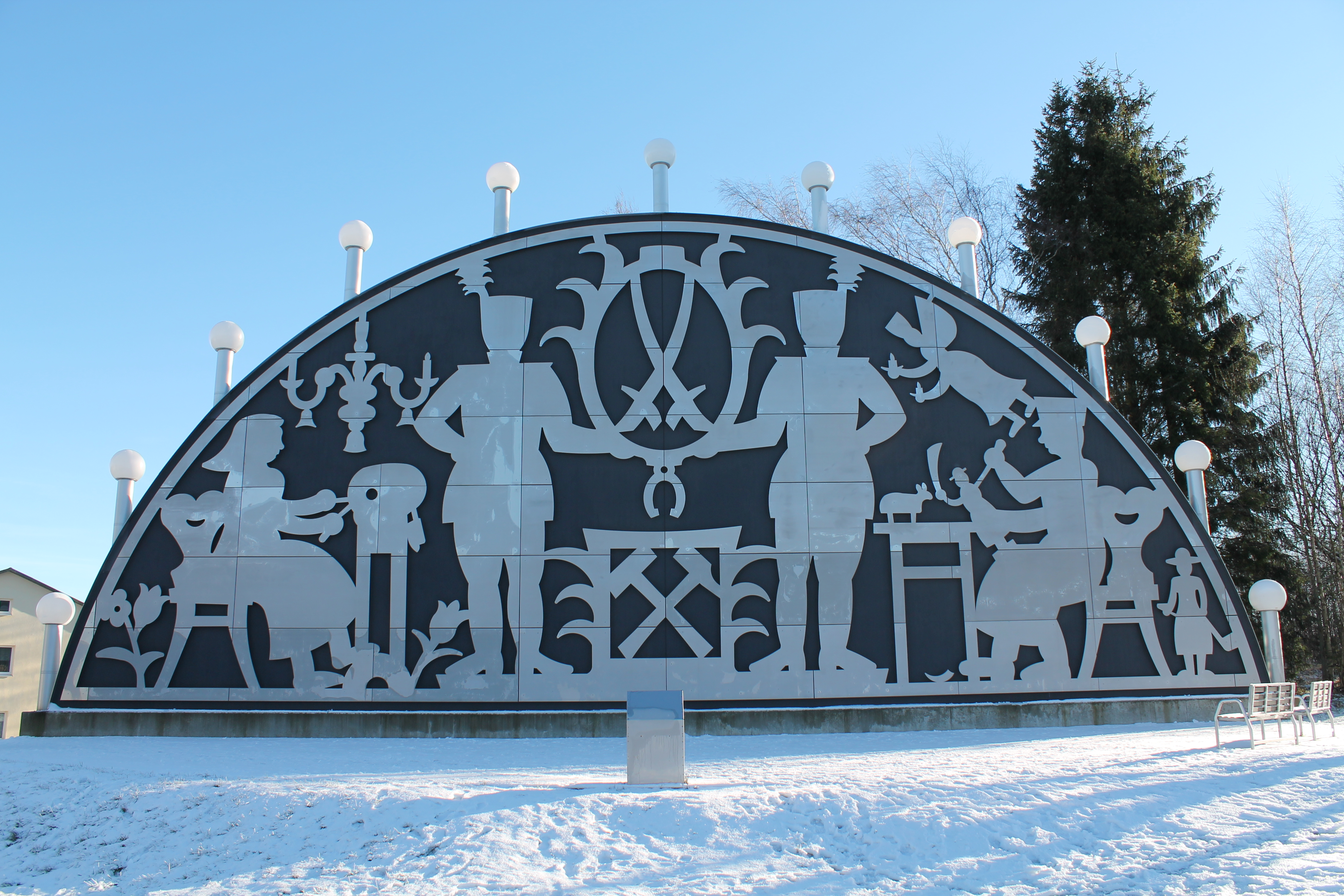 Riesenschwibbogen in Johangeorgenstadt im Winter